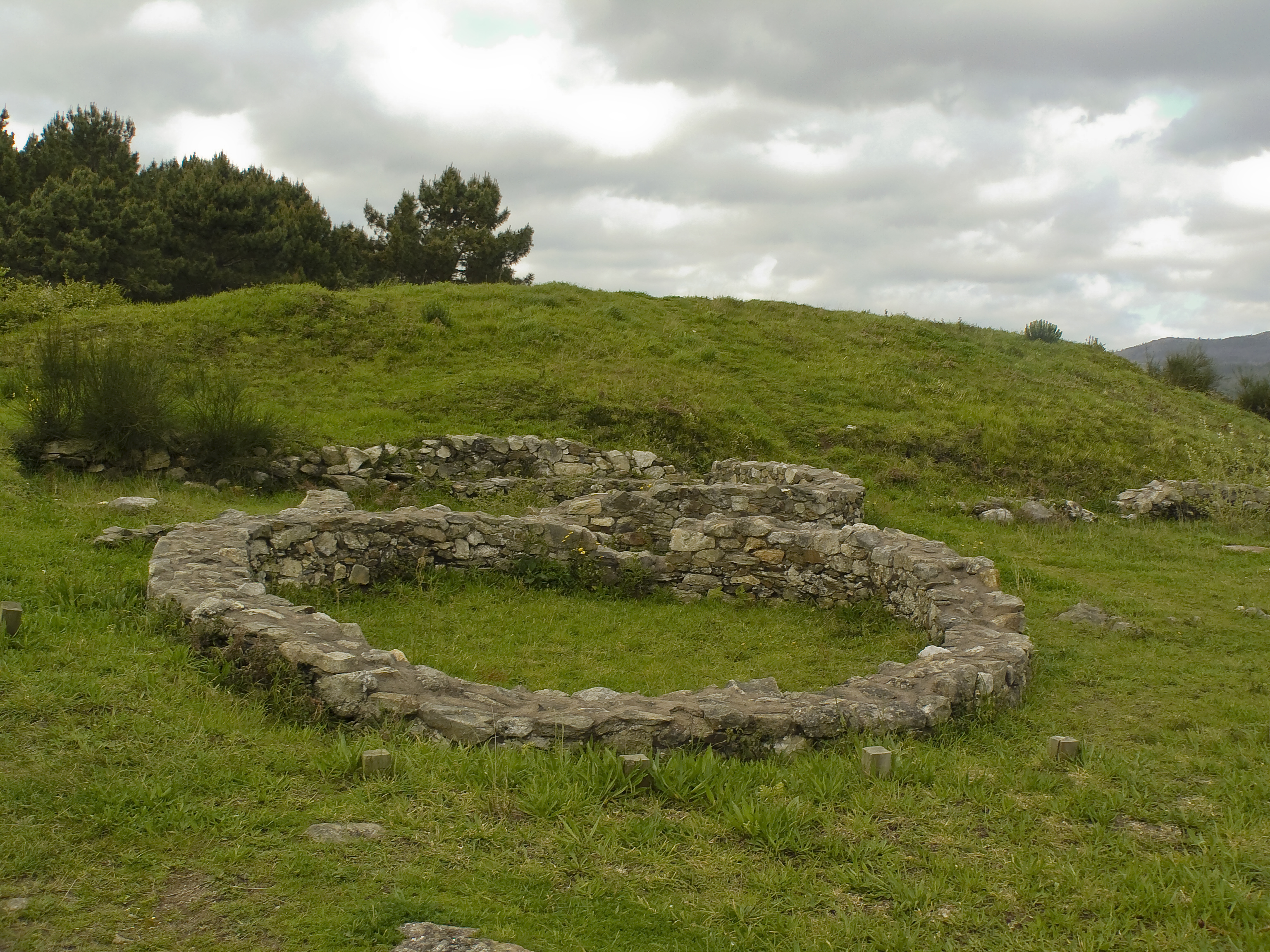 Castros de Neixón, Cespón, Ribeira